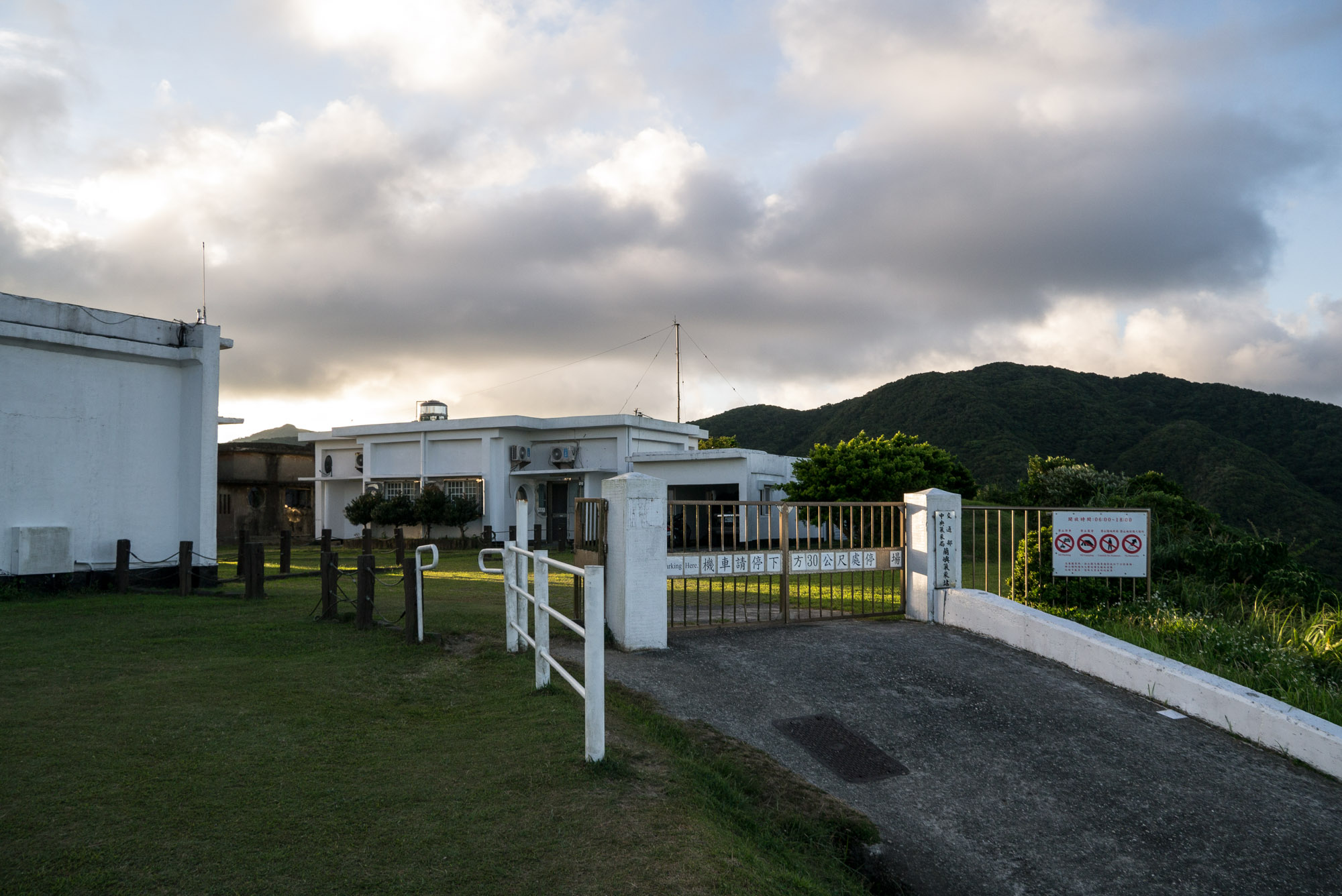 中華民國交通部中央氣象局蘭嶼氣象站，位於臺灣臺東縣蘭嶼鄉紅頭村2號。